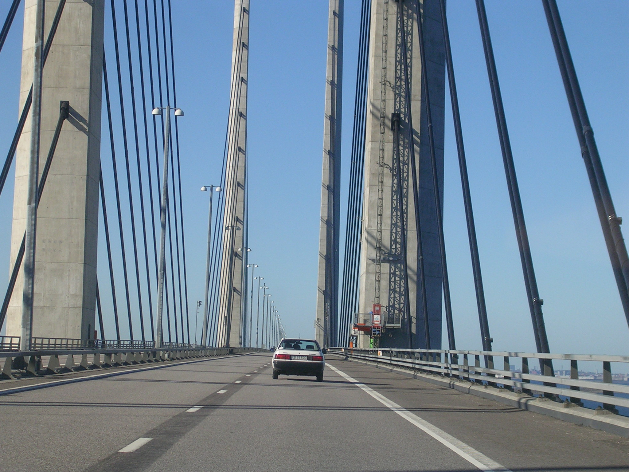 Øresund bridge Author: Väsk